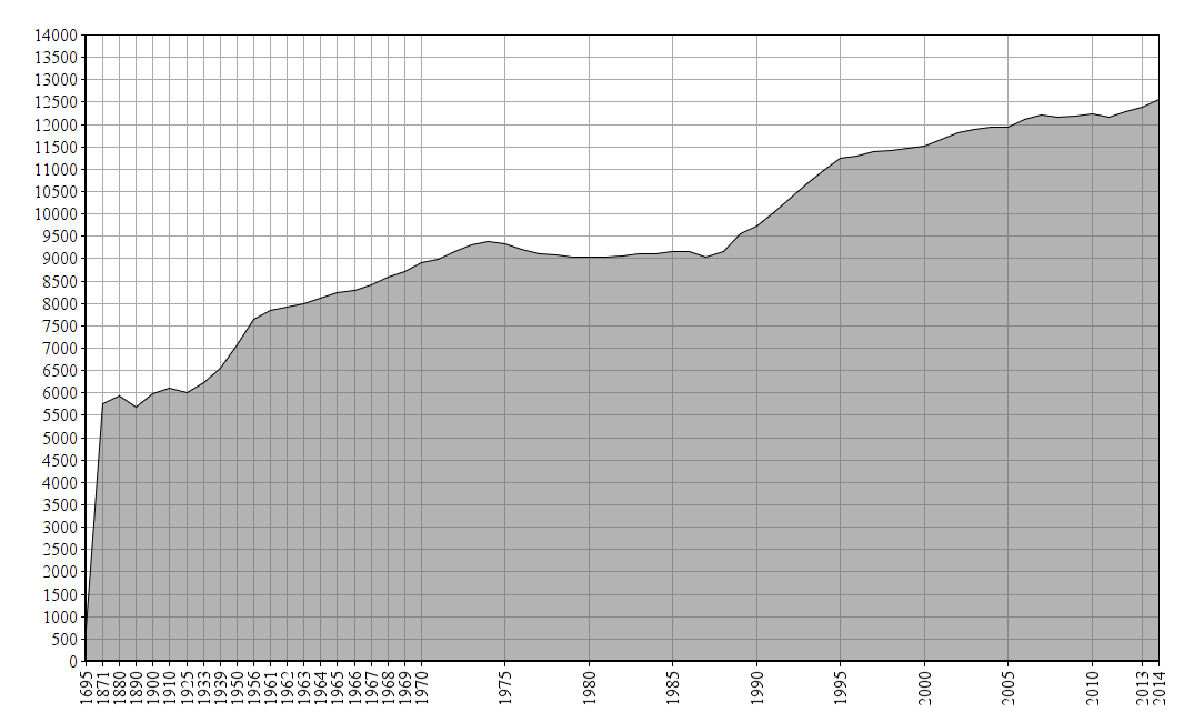 Dieses Bild zeigt die Bevölkerungsstatistik von Ettenheim